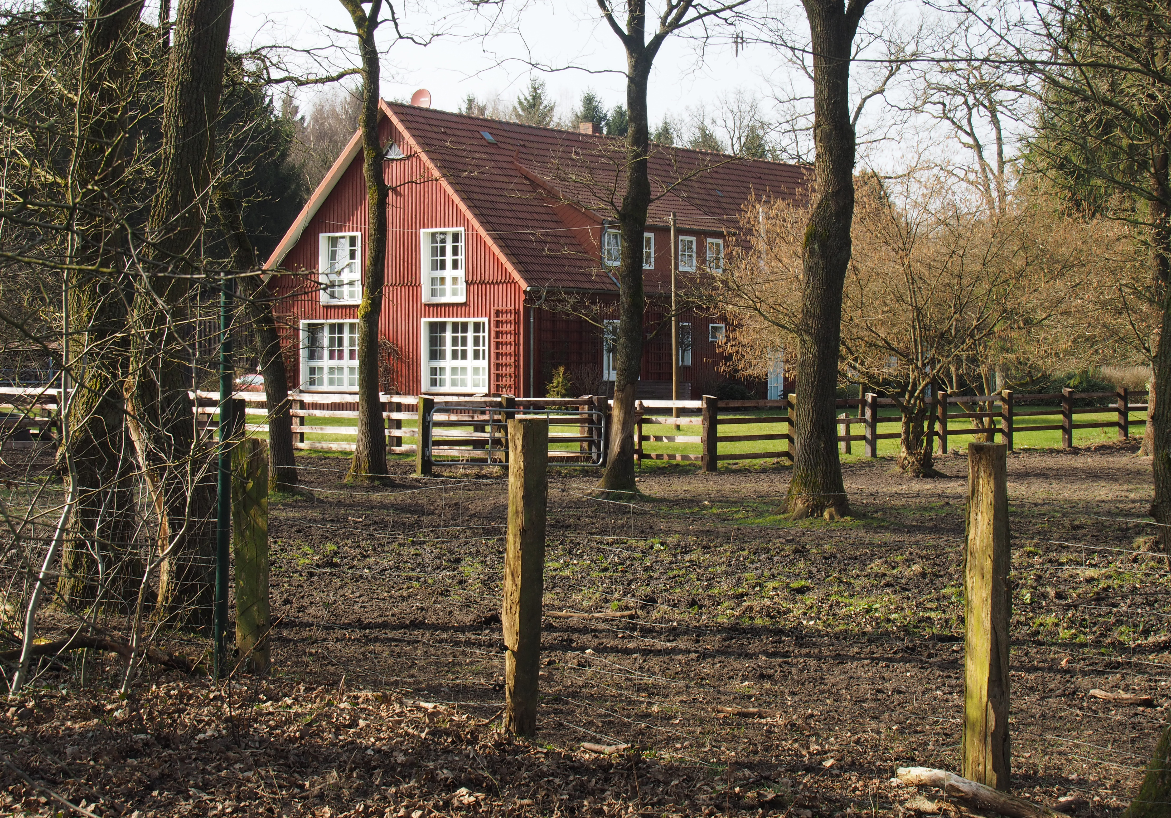 Hansburs-Hof im Westenholzer Bruch, bekannt aus dem Roman von Hermann Löns: „Der letzte Hansbur“